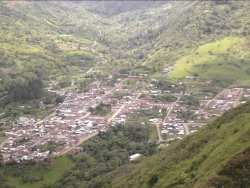 Panorámica del Municipio de Toribío desde el occidente.